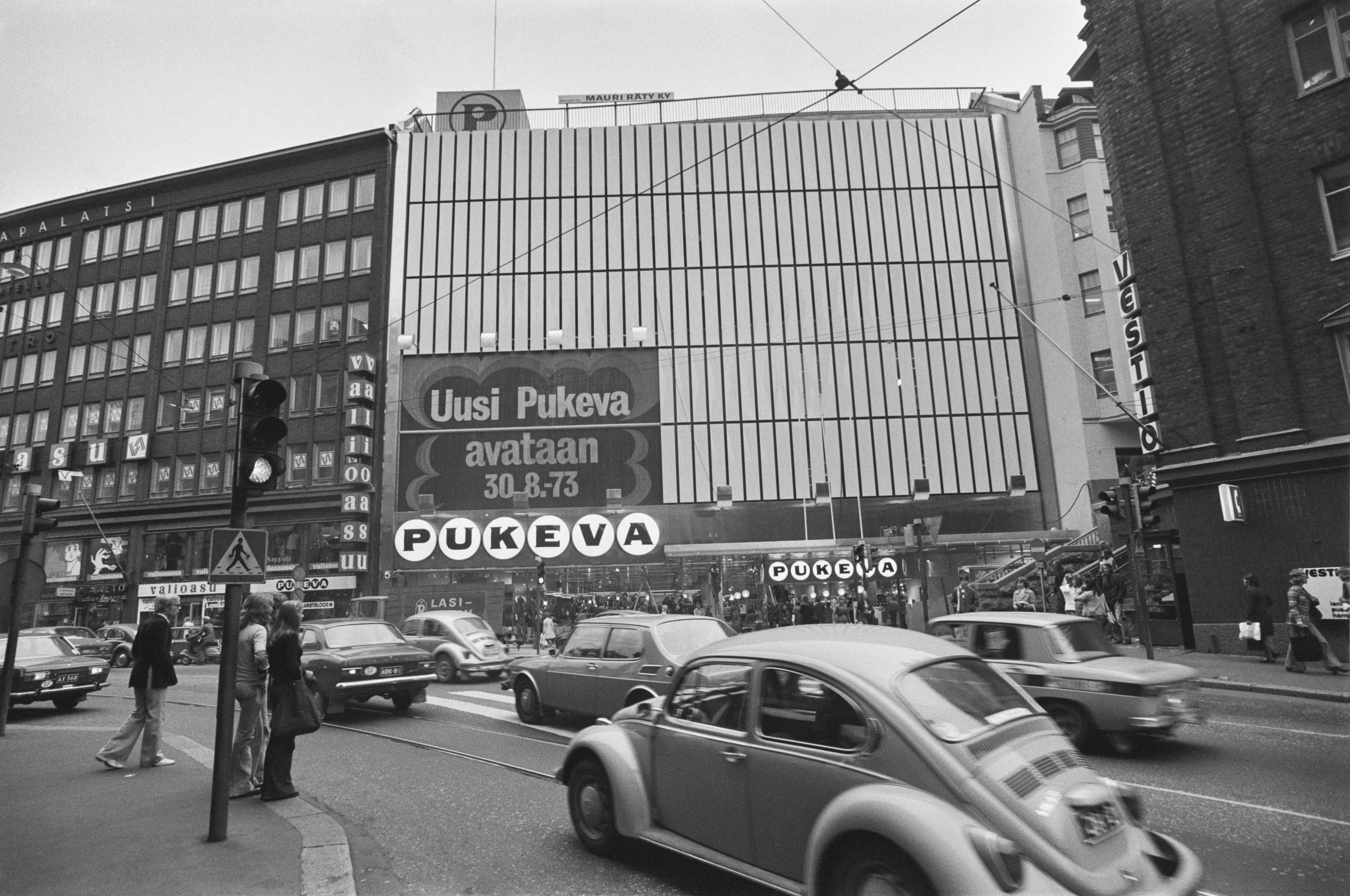 Kaisaniemenkatu 5. Pukevan uudistuneen tavaratalon julkisivua Kaisaniemenkadun suunnalta laajennusosan valmistuttua. Seinässä teksti: Uusi Pukeva avataan 30.8.1973. -- , , mv